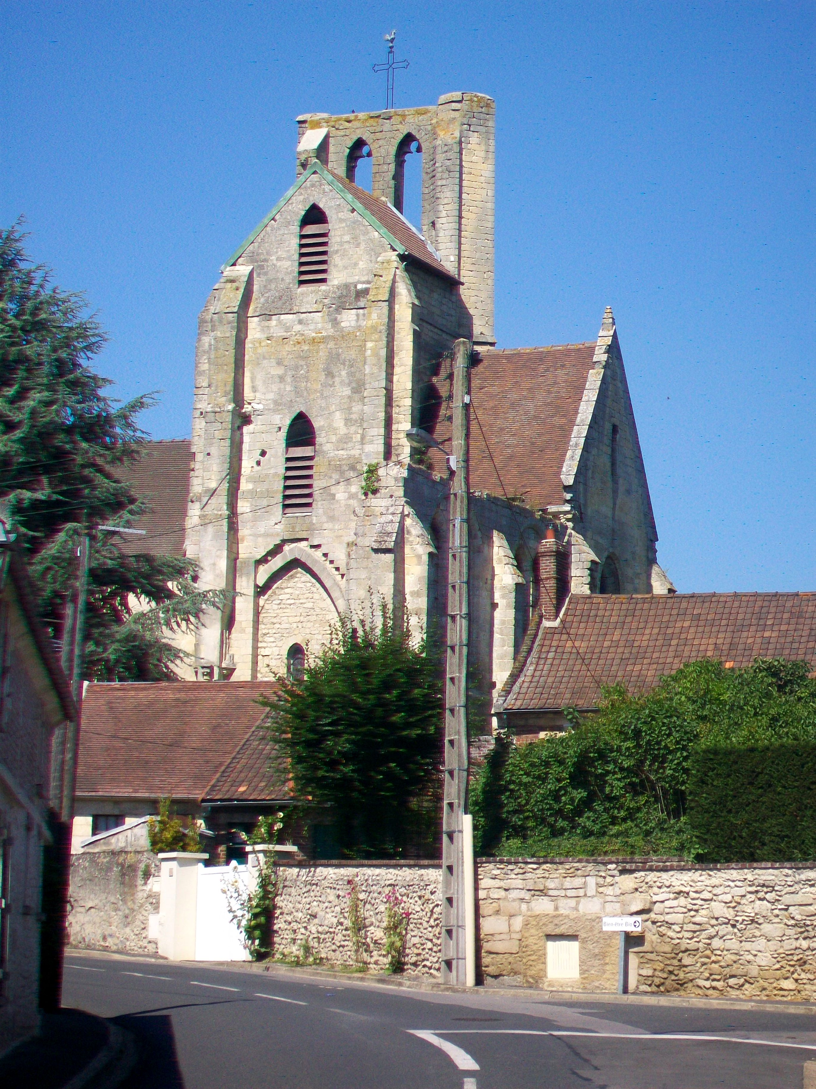 Clocher, chœur et vestiges du transept sud et de la grande chapelle depuis le sud.